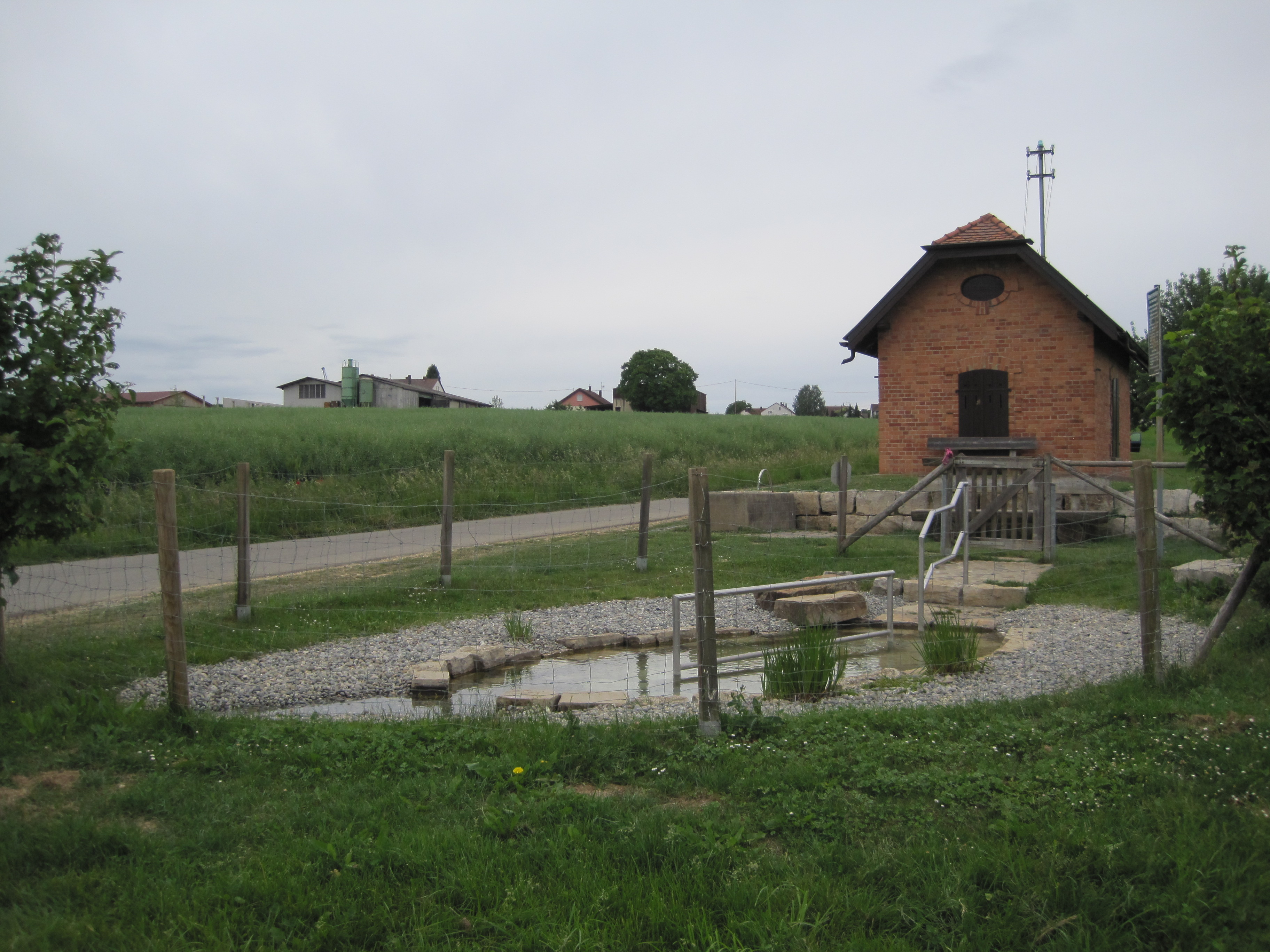 Kneipp-Becken bei Altdorf